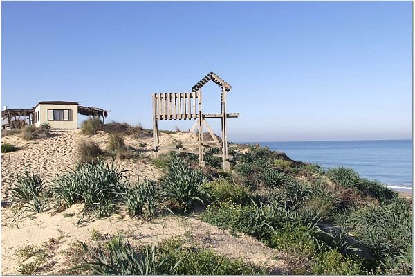 כפר ים התמונות באדיבות קטיף.נט (קישור) אתר האינטרנט של גוש קטיף. צילם: מוטי סנדר.